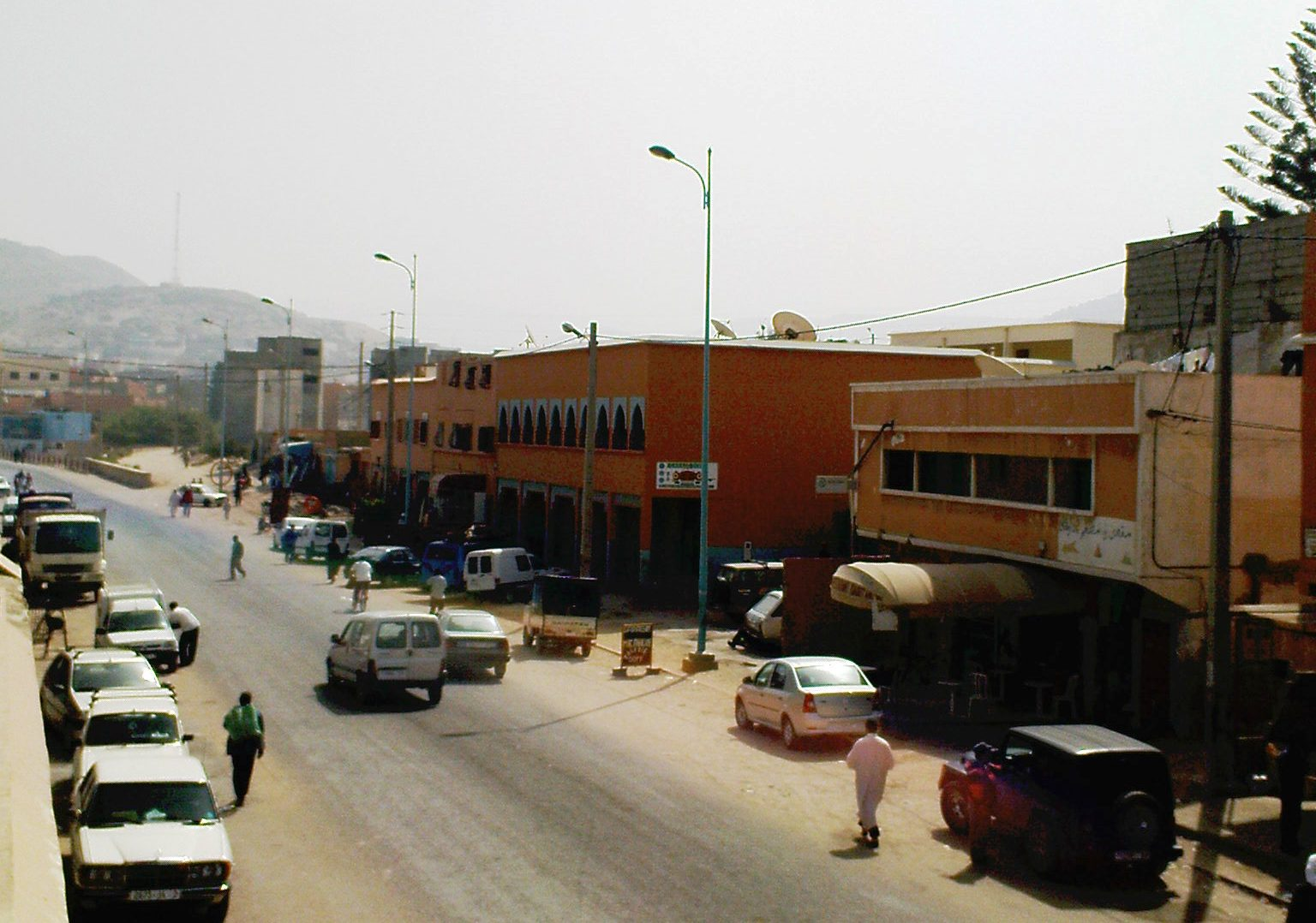 Tašlḥiyt/ⵜⴰⵛⵍⵃⵉⵜ: Aourir: tamdint gh ifuss lmrruk tgua zu agadir 12 km, d taghazout 8 km tli gh igharassn n Tassourt N1 d win Imouzzer Idaoutanan li mo n tini agharass n tament.